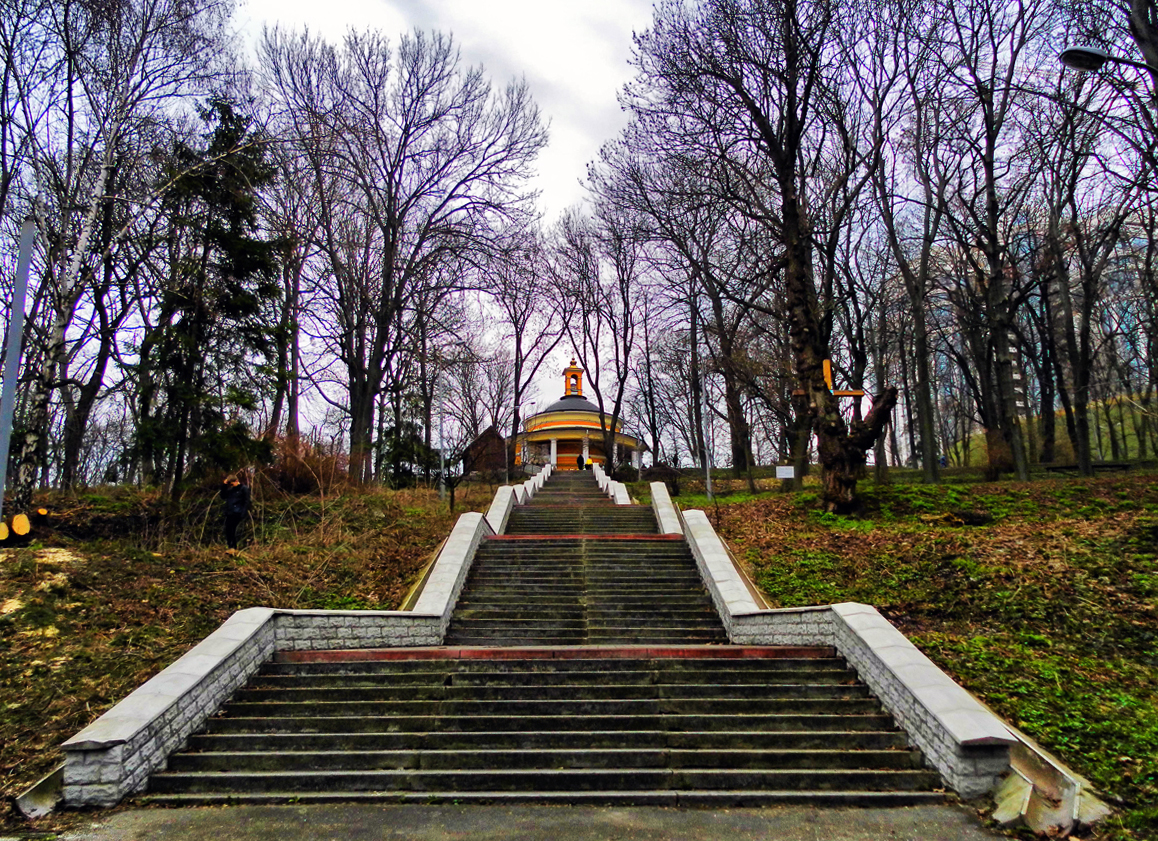 Церква Миколи на Аскольдовій могилі (ротонда), Київ, Паркова дорога